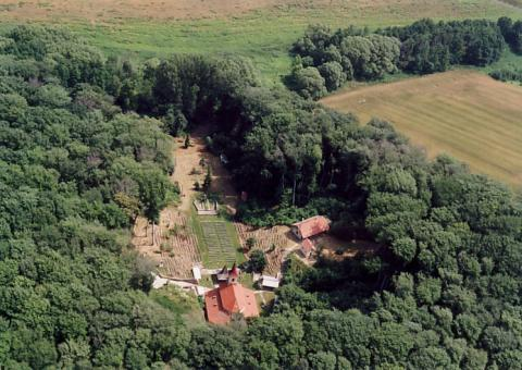 Csatka, Hungary, aerial photography